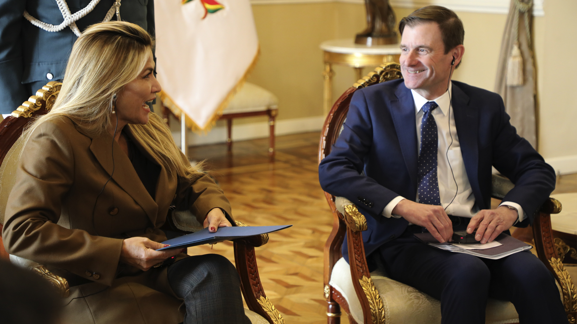 El subsecretario de Estado para Asuntos Políticos David Hale tuvo una linda reunión con la Presidenta Jeanina Añez. Muchas gracias por el cordial recibimiento.